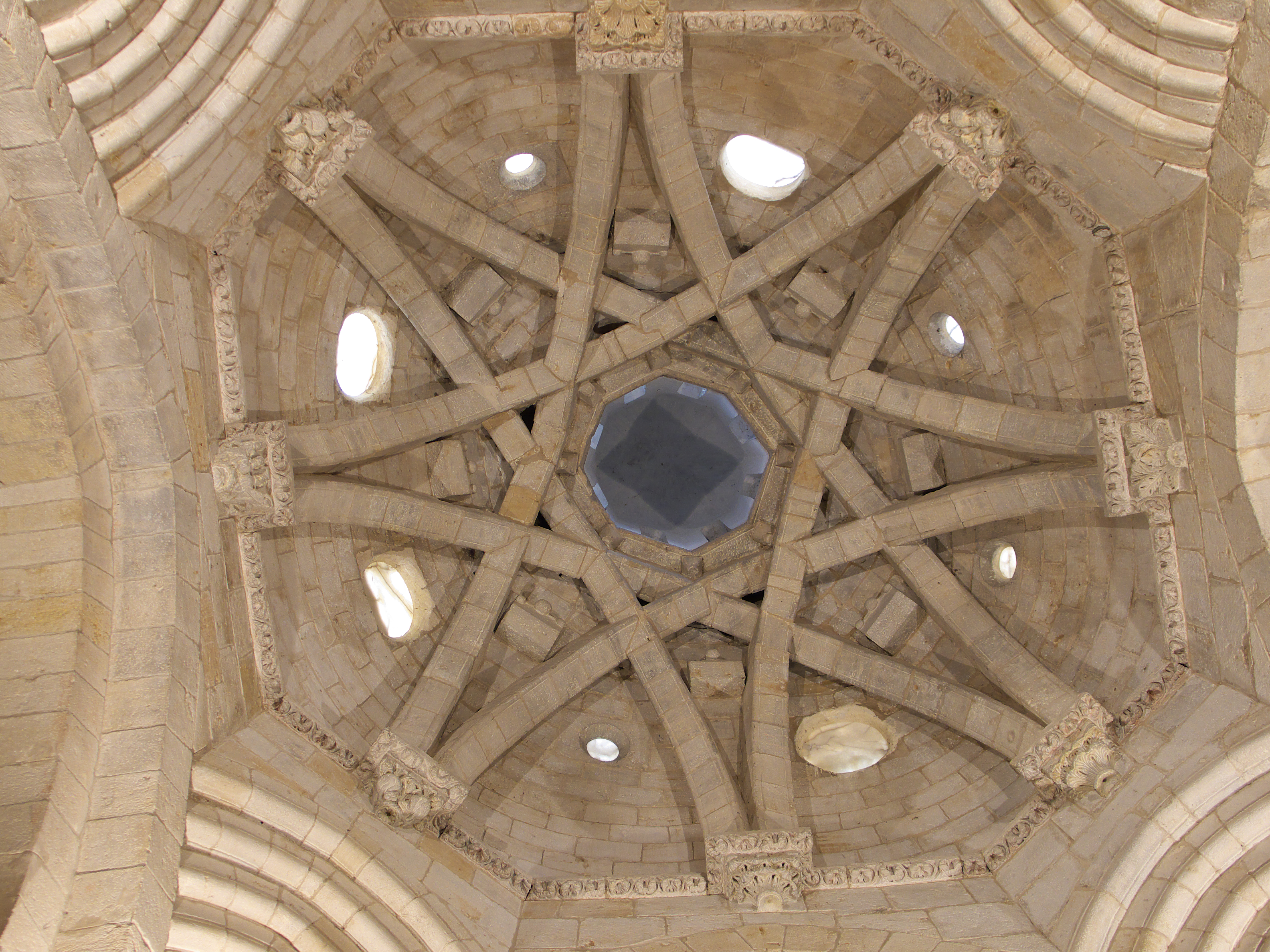 Cúpula de la Iglesia de San Miguel, Almazán (s. XII). Toma el modelo de la maqṣūra de la mezquita de Córdoba. Bóveda de la Capilla de Villaviciosa (Mezquita-Catedral de Córdoba Bóveda en la Mezquita de Bab al-Mardum (Toledo)